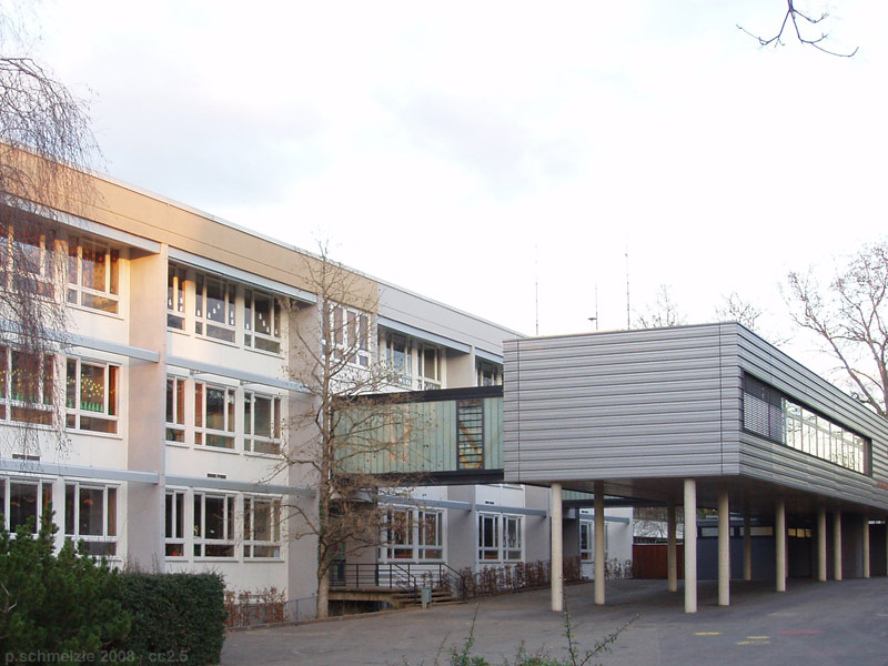 Gerhard-Hauptmann-Schule in Heilbronn